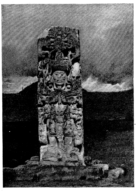 Stela B. Front